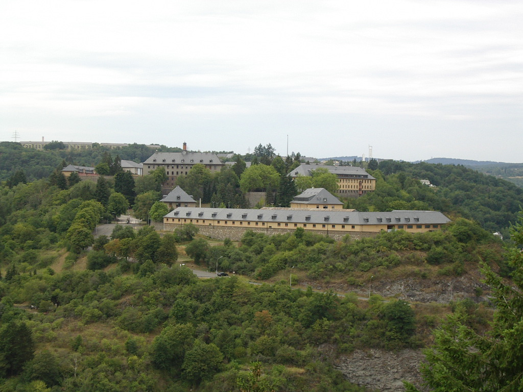 Blick auf die Klotzbergkaserne in Idar-Oberstein.